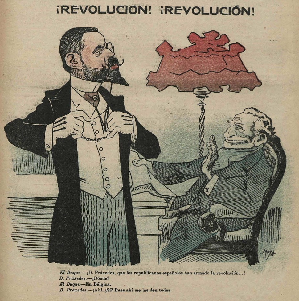 ¡Revolución! ¡Revolución!.